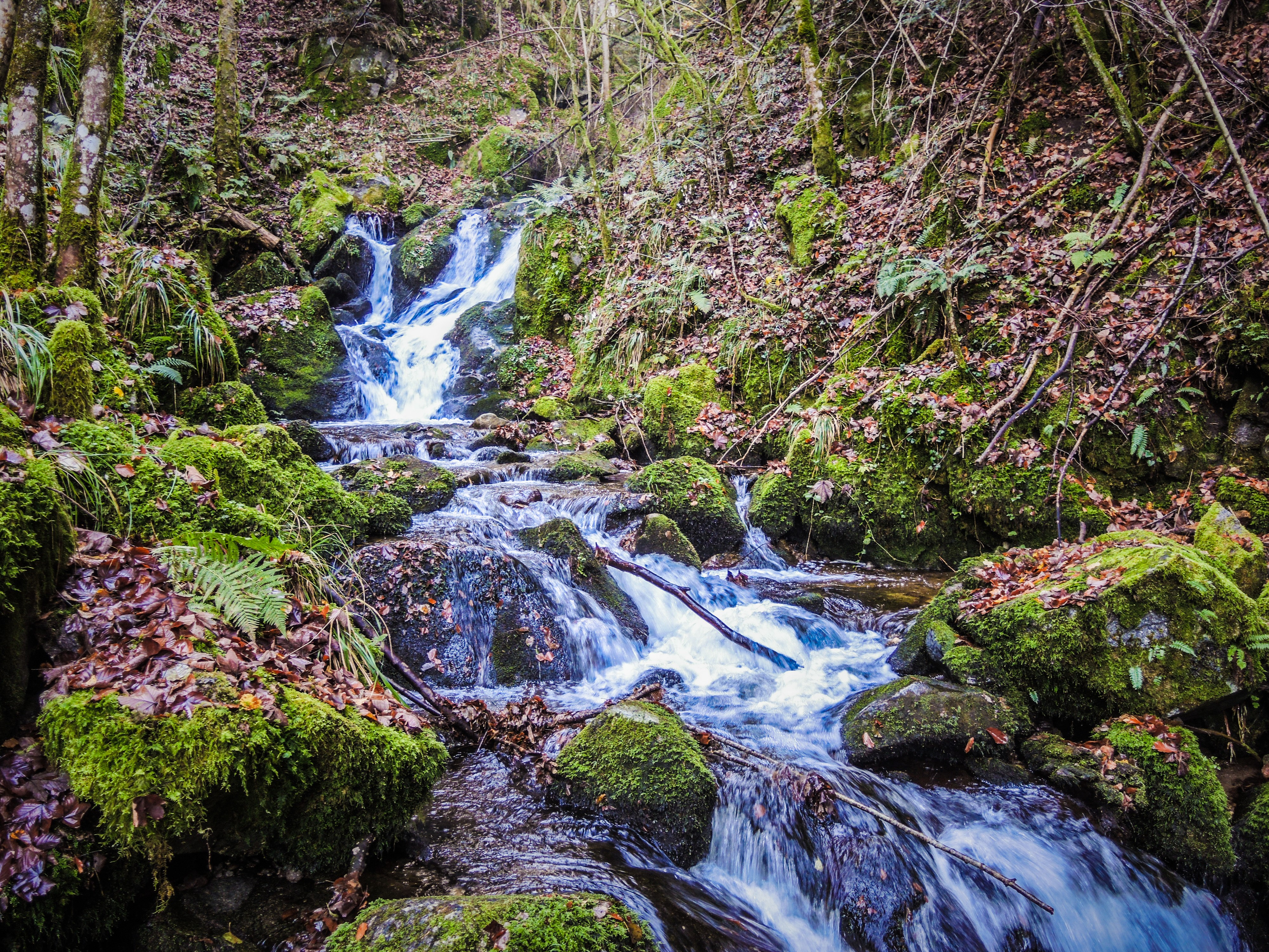 Cascade saint Nicolas. Kruth, Haut-Rhin.